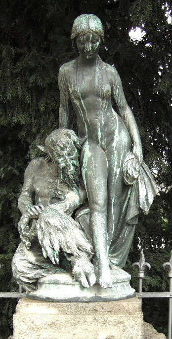 Wilhelm Neumann-Torborg: „Faun und Nymphe“ (1890) – seit 1909 in Bonn-Bad Godesberg vor der Redoute